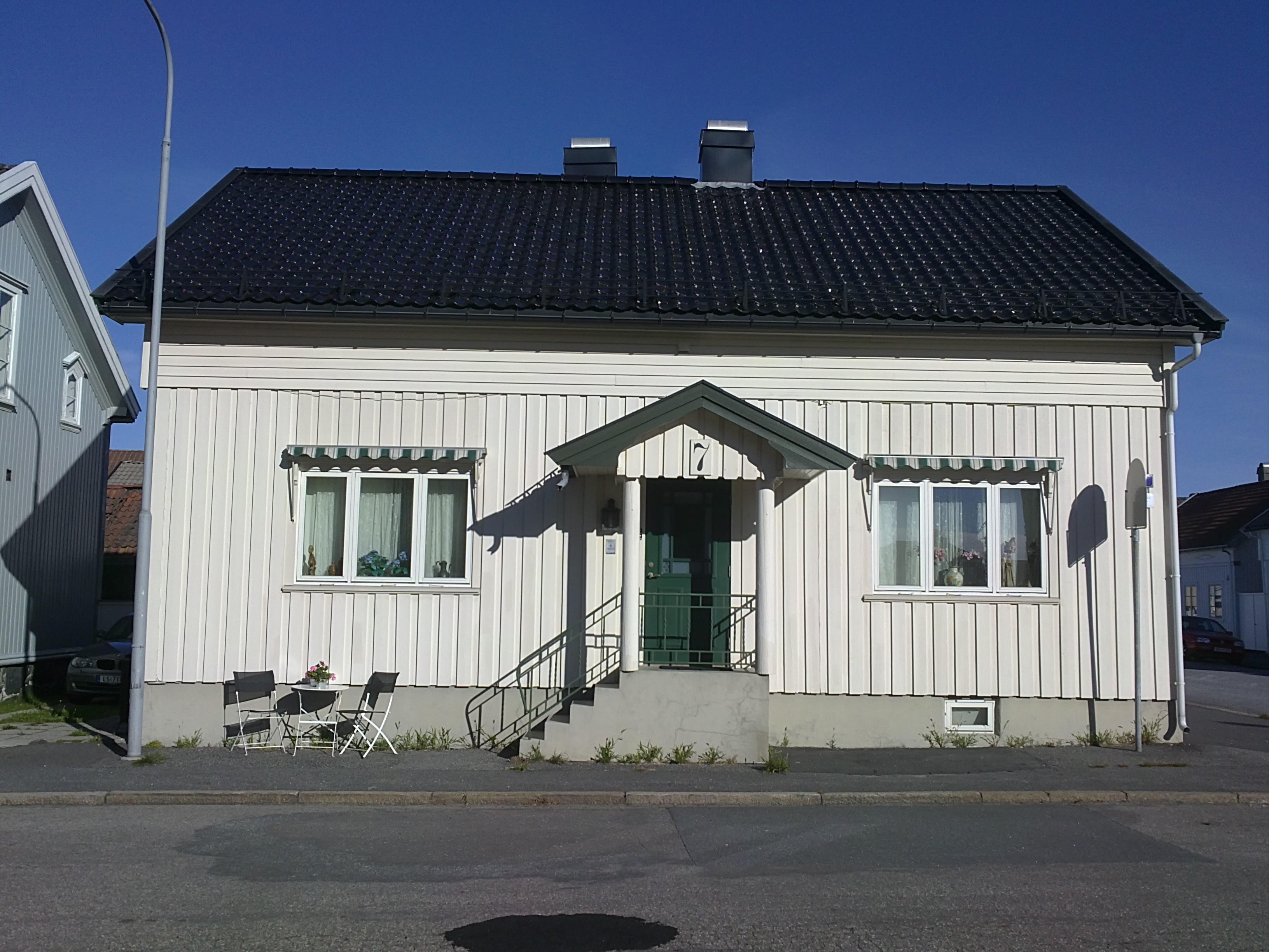 Bilde av Helgesens gate 7, Larvik, bildekunstneren Carl Nesjars barndomshjem